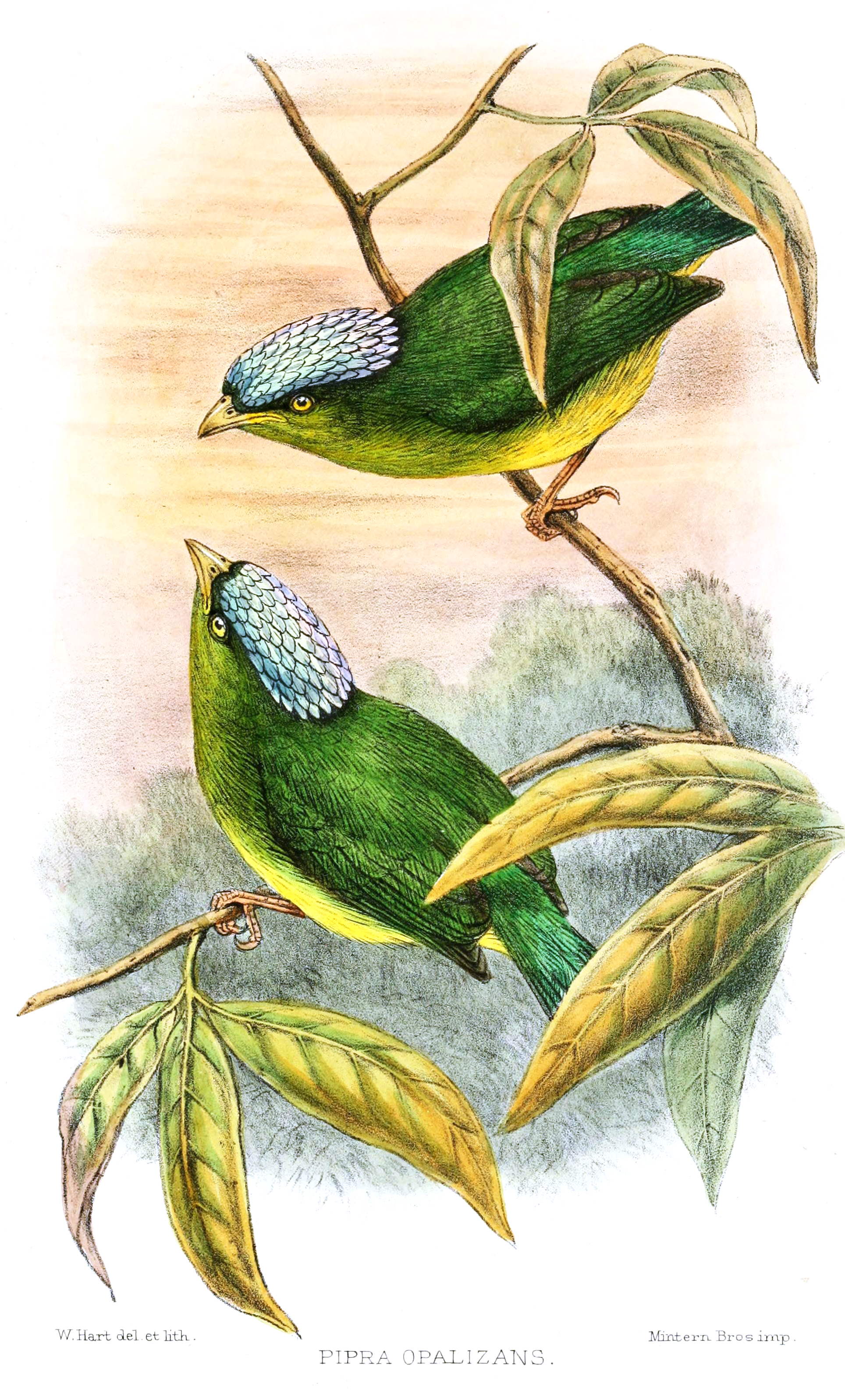 Pipra opalizans = Pipra iris